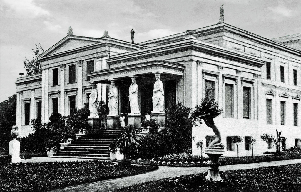 Дворец Кляйн Байнунен